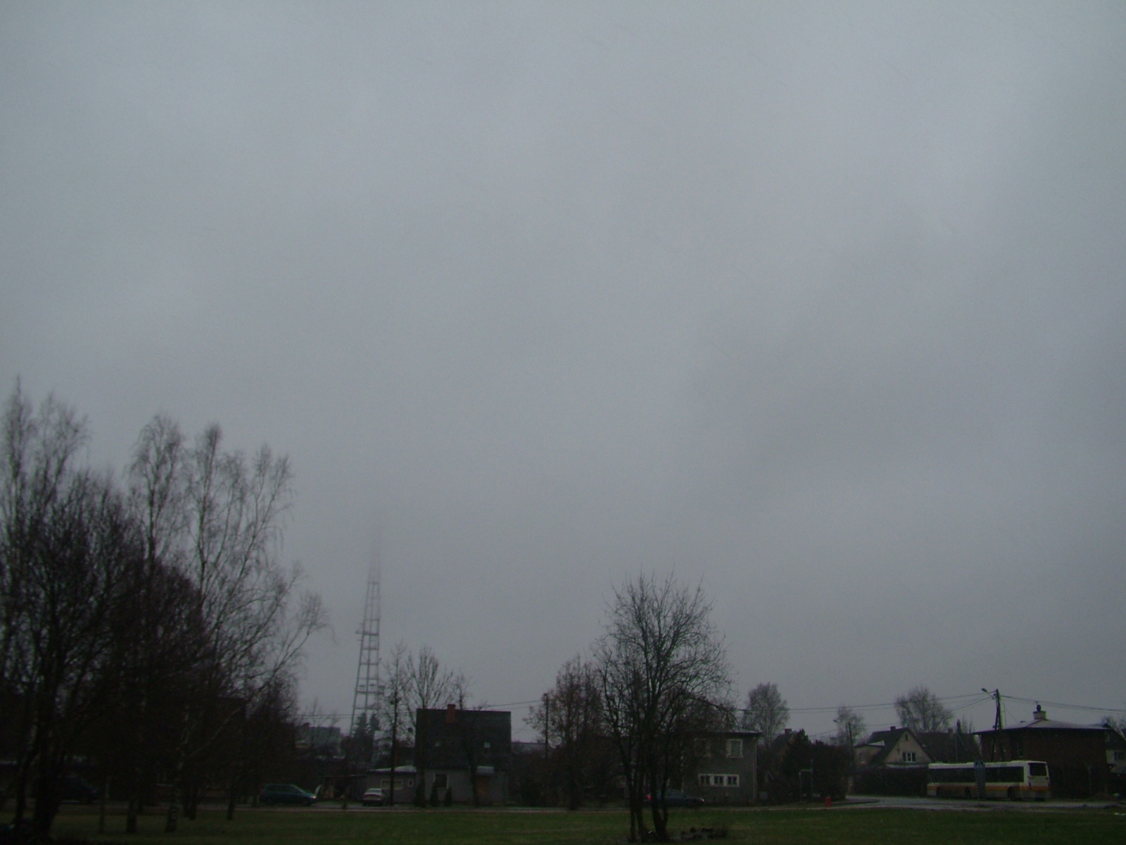 Kihtpilved Tartus 23.11.2010